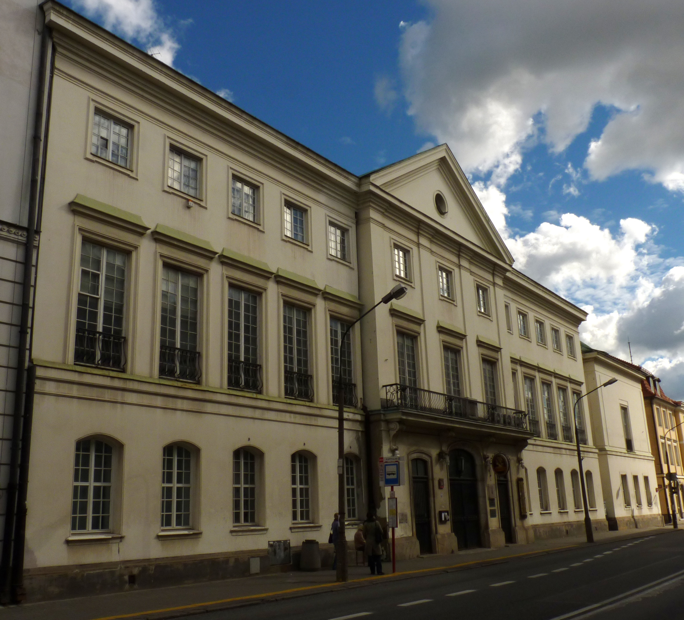 Warszawa, pałac Chodkiewiczów, kon. XVII, XIX, po 1948